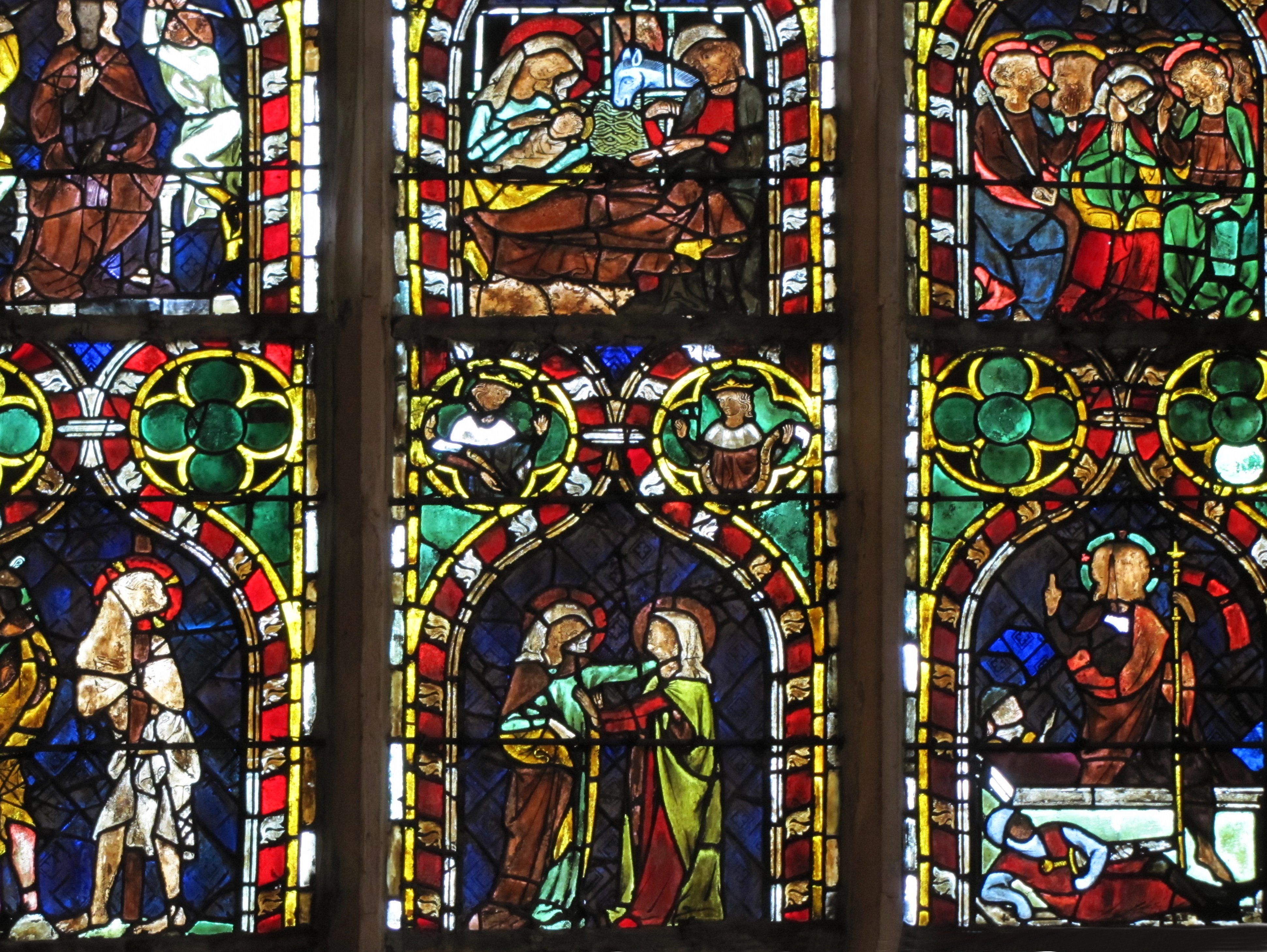 Alsace, Bas-Rhin, Église protestante Saint-Guillaume de Strasbourg (PA00085026).Détails d'une verrière de 1310 restaurée en 1872 "Vie du Christ".